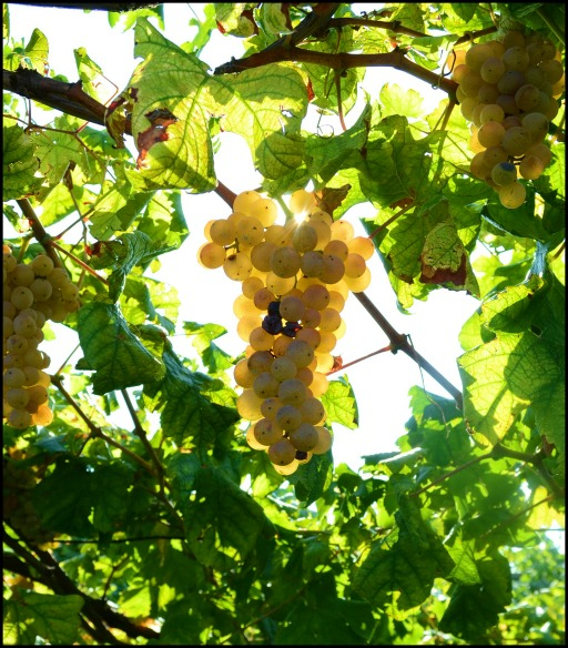 Grappolo di Erbaluce pronto per la vendemmia